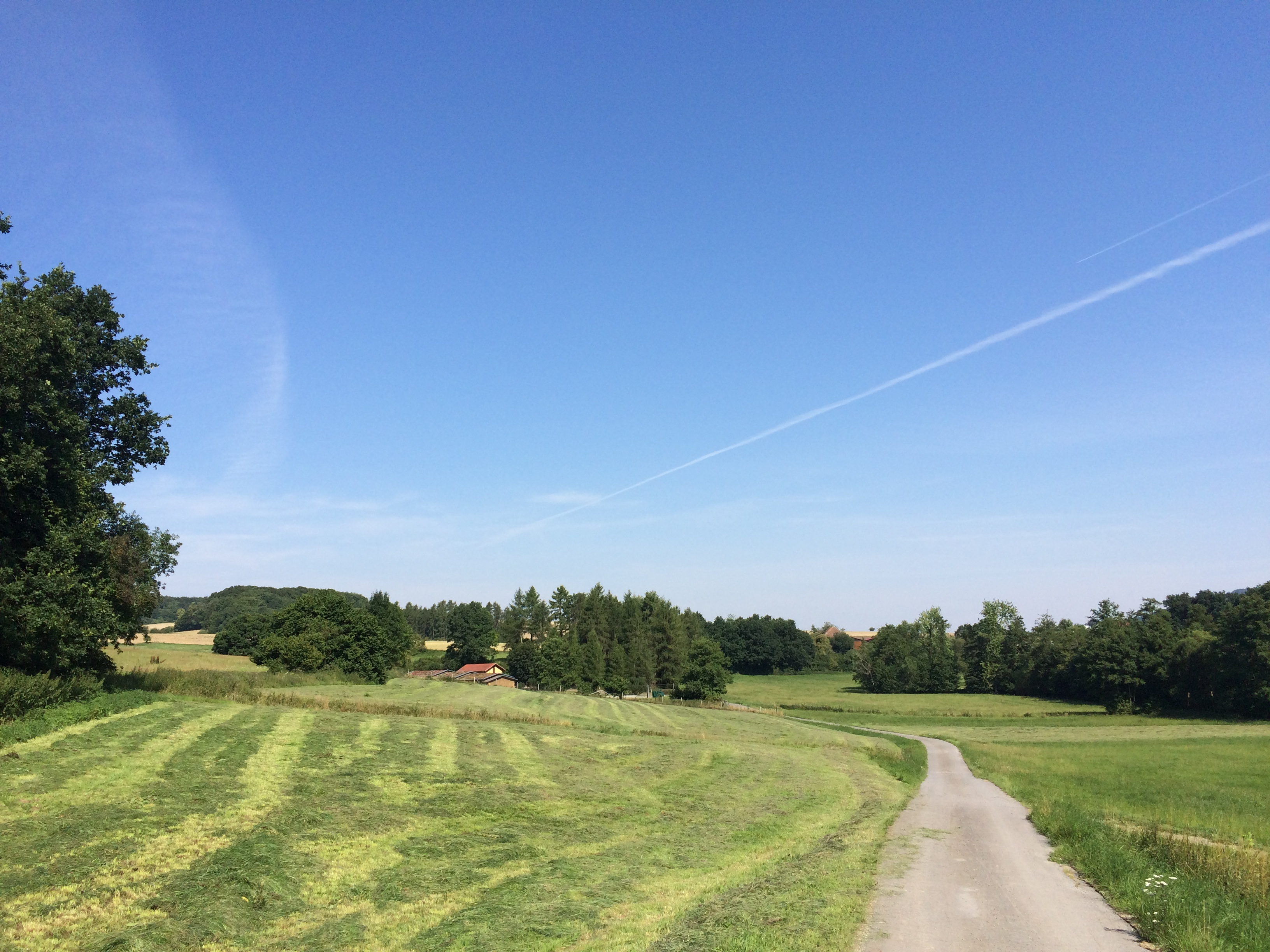 Der Volkmarser Weg (V) zwischen dem Lohweg in Altendorf und dem Heiligenberg im Elbetal südlich des Burgstalles Beltershausen